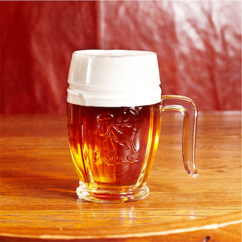 Česky: Velkopopovický Kozel světlý